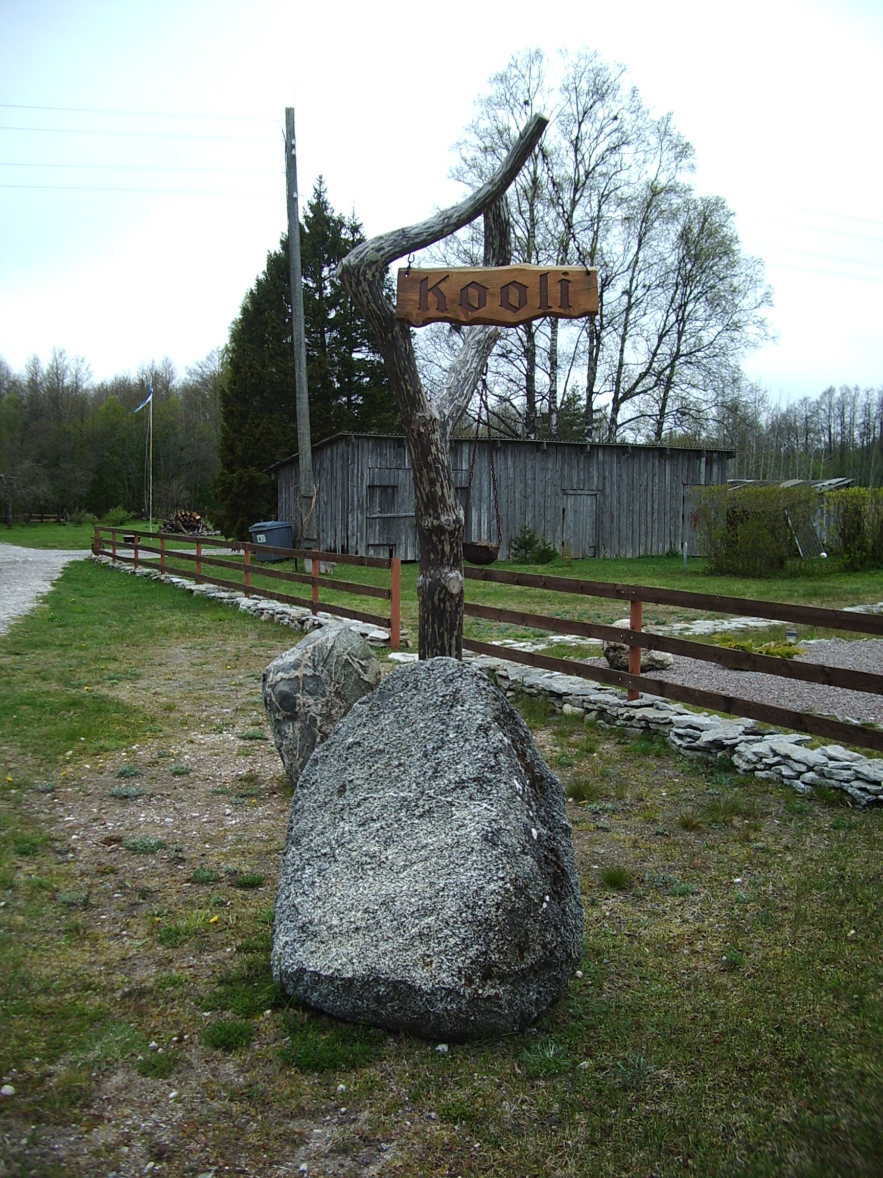 Silt Anseküla endise algkooli juures